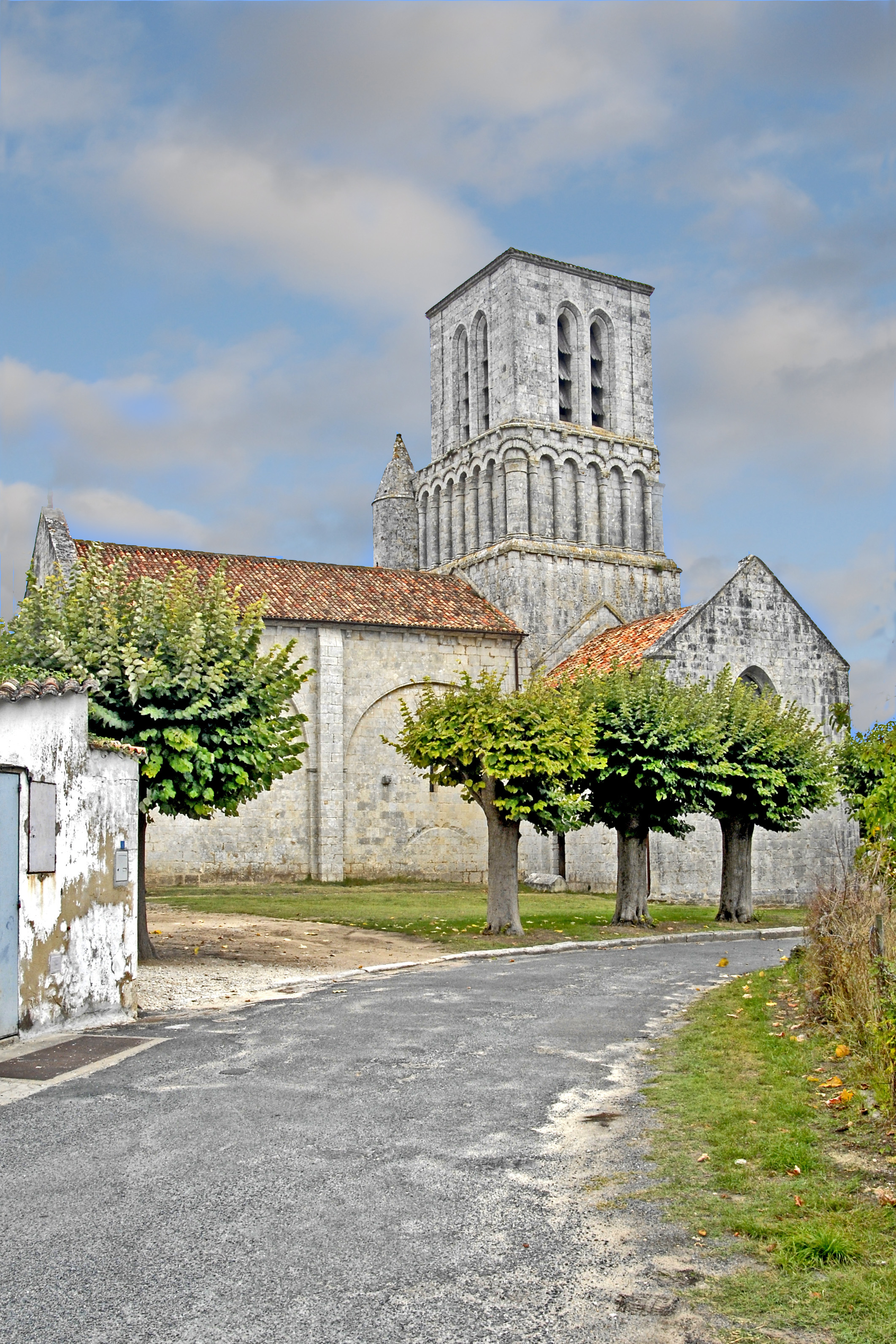 Noter-Dame Corme-É§cluse, von Süden